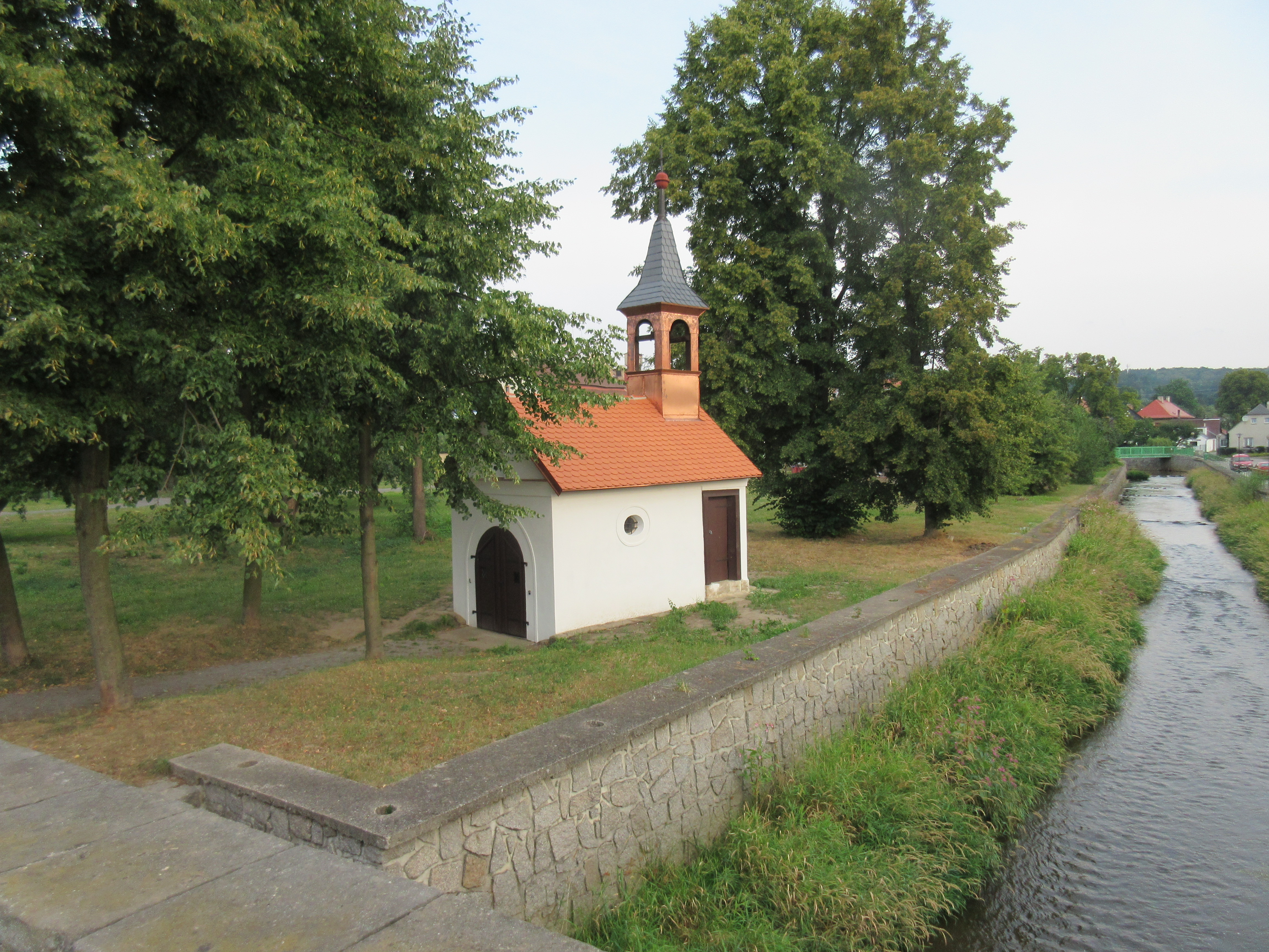 Zrenovovaná kaple v roce 2015, vpravo polovyschlá svitávka